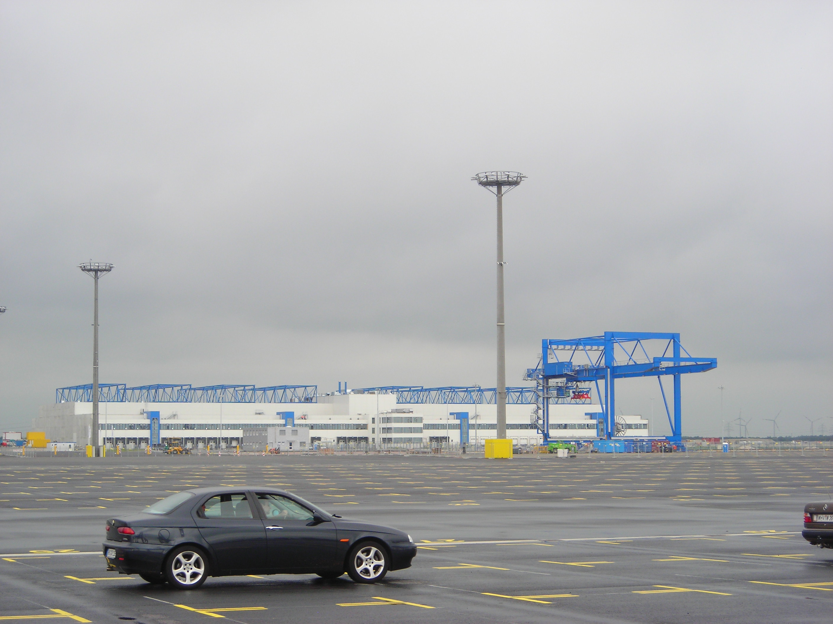 Das Nordfrost-Terminal mit der Grenzabfertigungsstelle